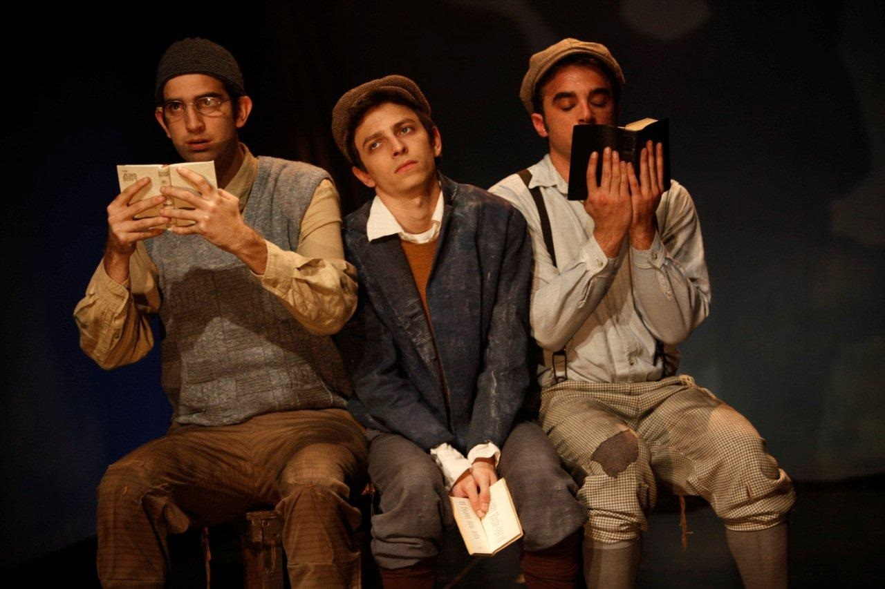 היצור, סמינר הקיבוצים \ צוותא